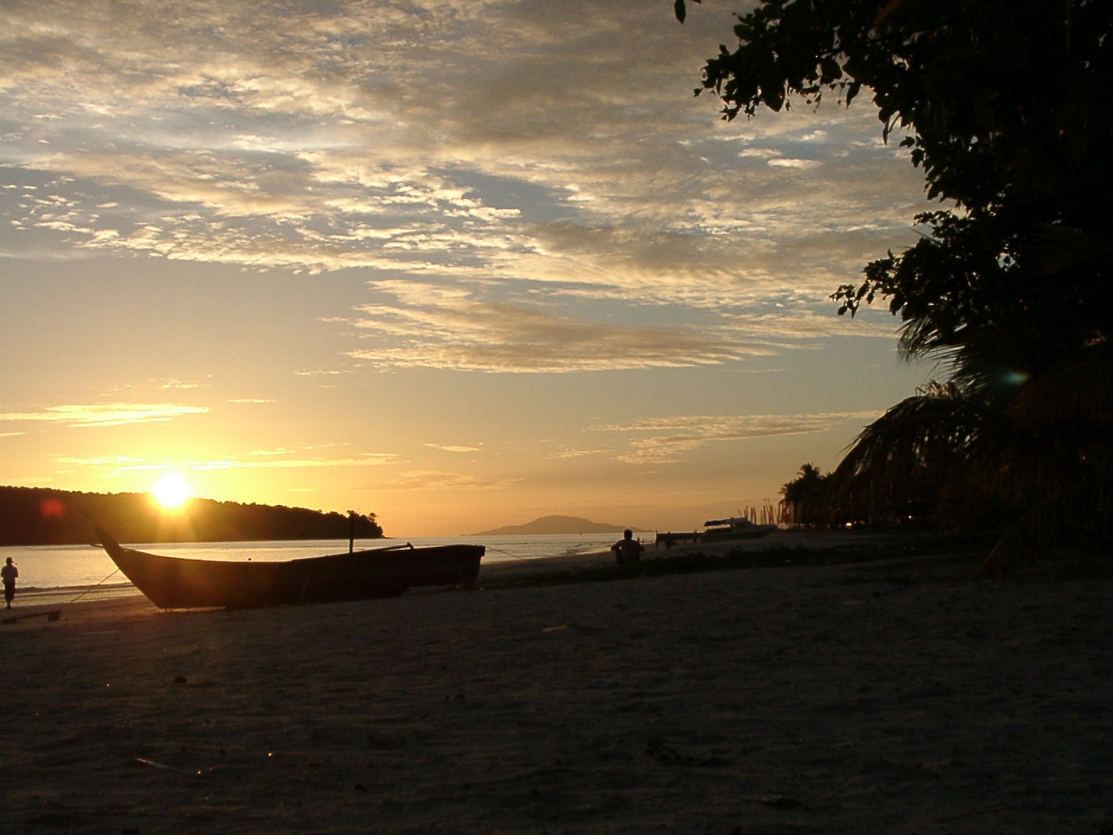 Sunset at a beach on Langkawi, Malaysia